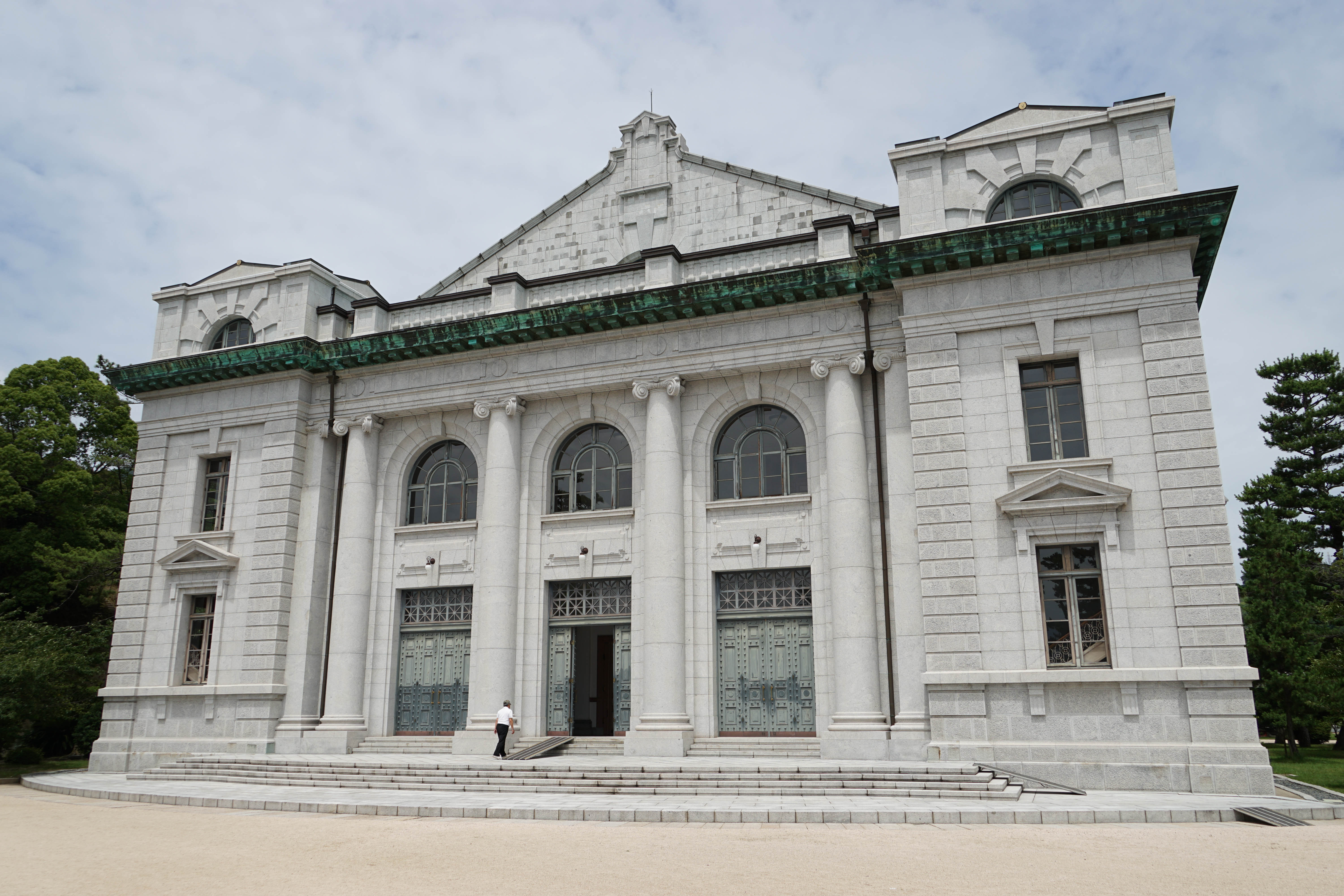 海軍兵学校 (日本)の大講堂